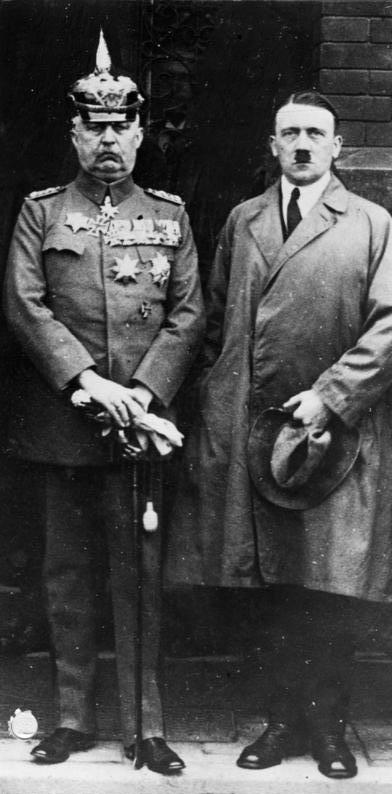 Zum 70. Geburtstag des Feldherrn General Ludendorf[f]am 9.April 1935 Eine Erinnerung aus den Anfängen der Bewegung vor 12 Jahren in München. Der jetzige Führer und Reichskanzler mit dem Feldherrn General Ludendorf[f] in München.